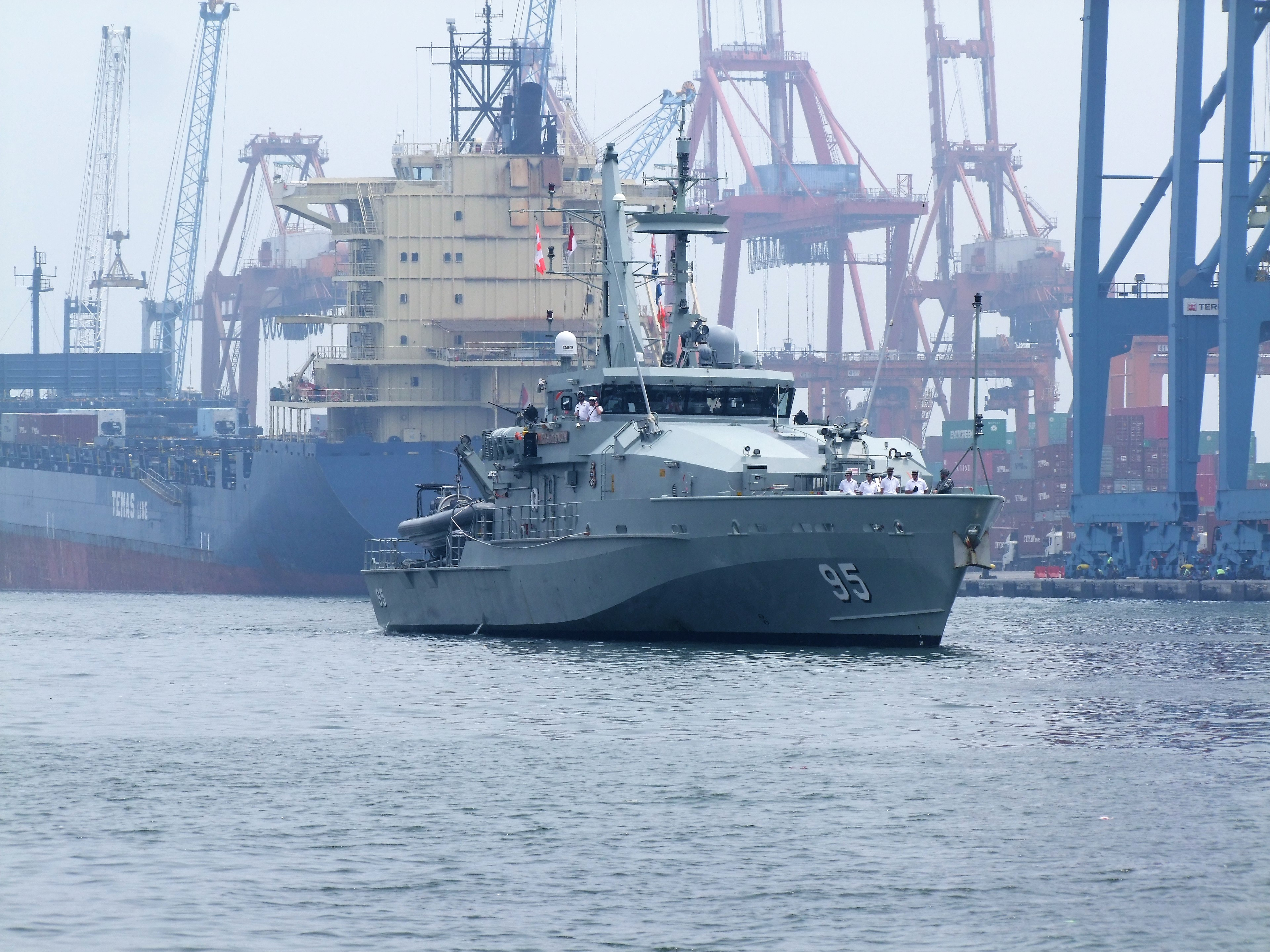 HMAS Maryborough disambut saat berlabuh di Tanjung Priok, Jakarta, untuk kunjungan selama lima hari.